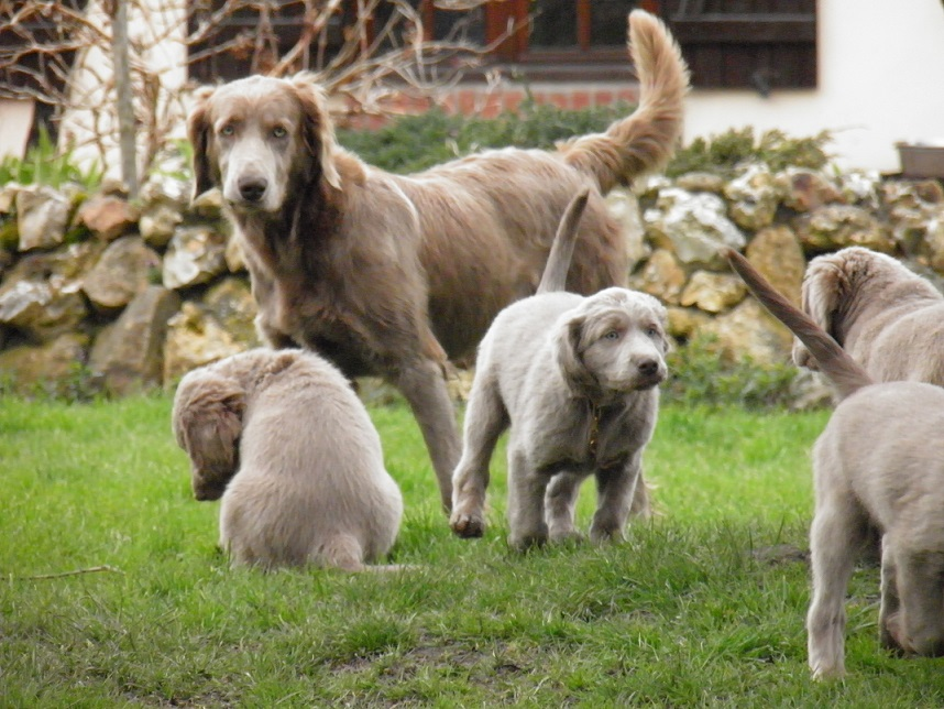 Mère et Chiots Weimar Poils Longs